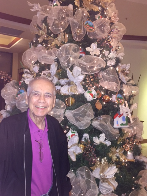 Pompeyo del Valle Navidad del 2015